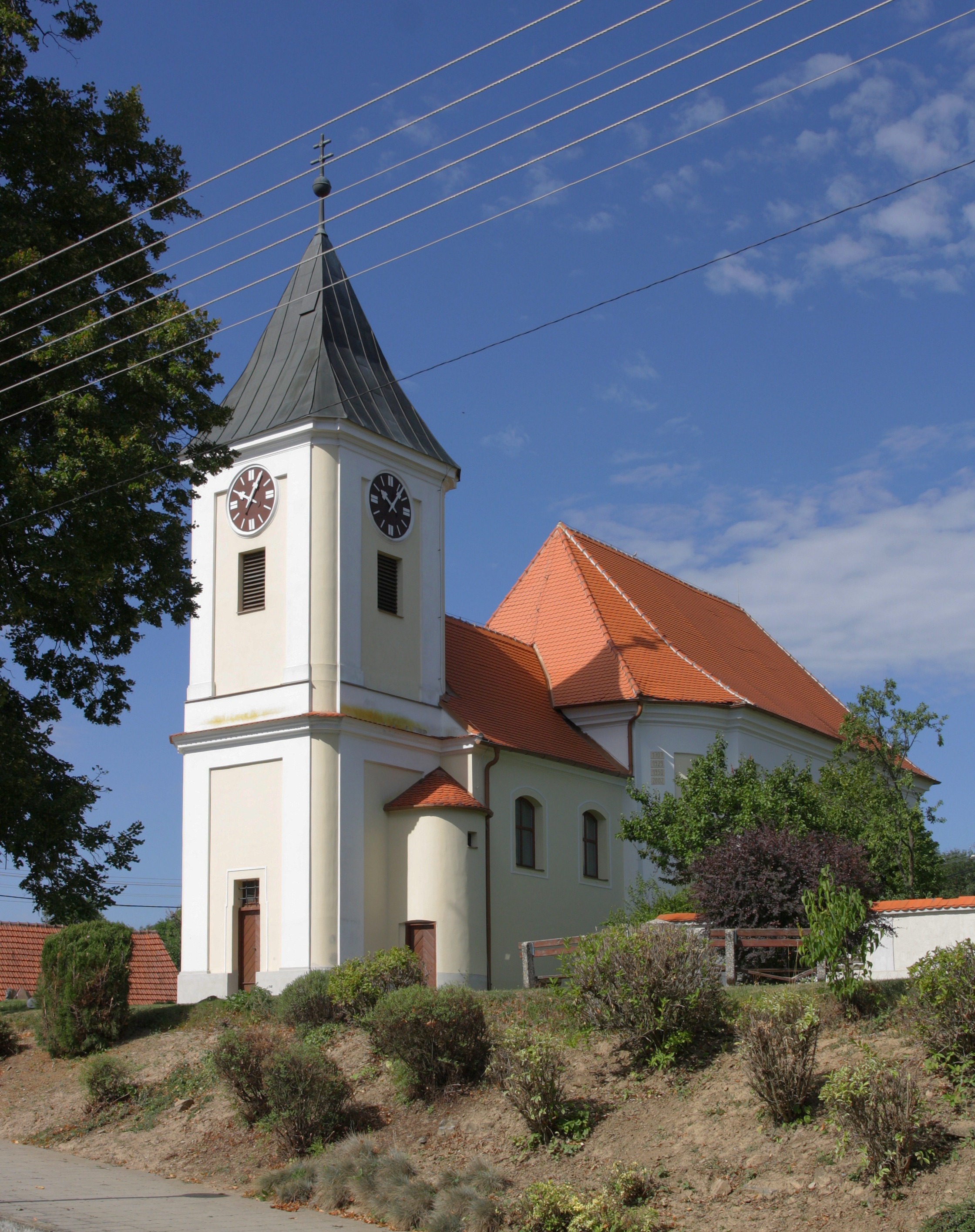 Čučice - kostel svatého Jakuba Staršího, pohled od SV